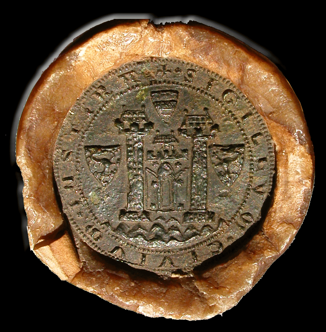 Siegel der Stadt Steyr, Umschrift: +SIGILLVM CIVIVM IN STIRA, Durchmesser 6,5 Zentimeter